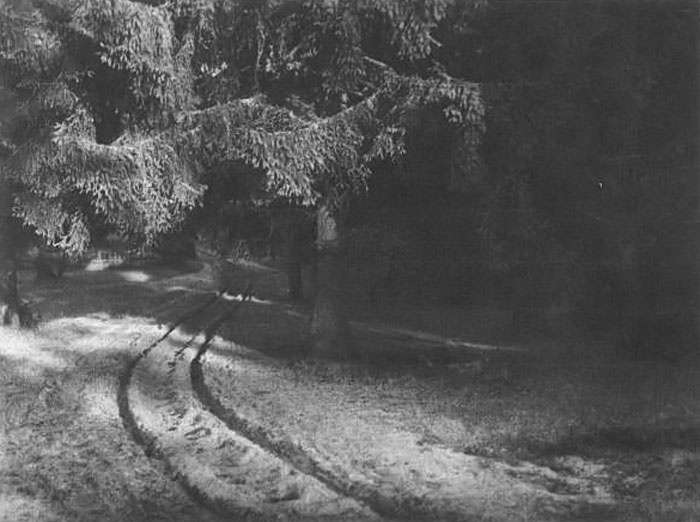 Беларуская (тарашкевіца): Рудніцкая пушча